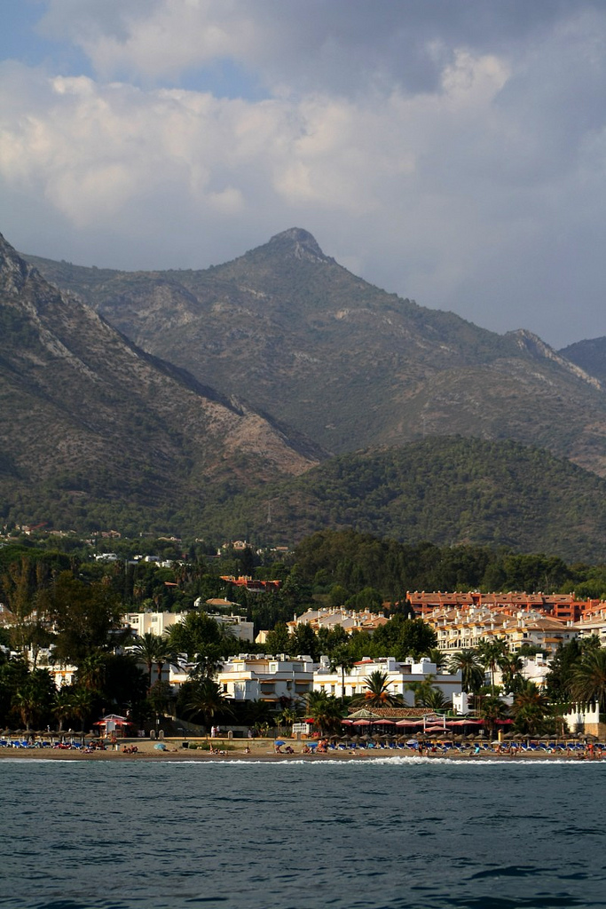 LA CONCHA, JUANAR